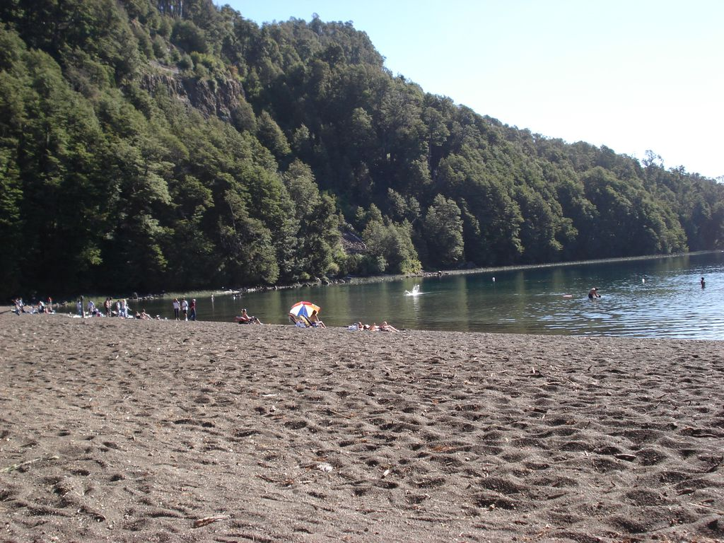 Playa en el lago Espejo, en la provincia del Neuquén Argentina